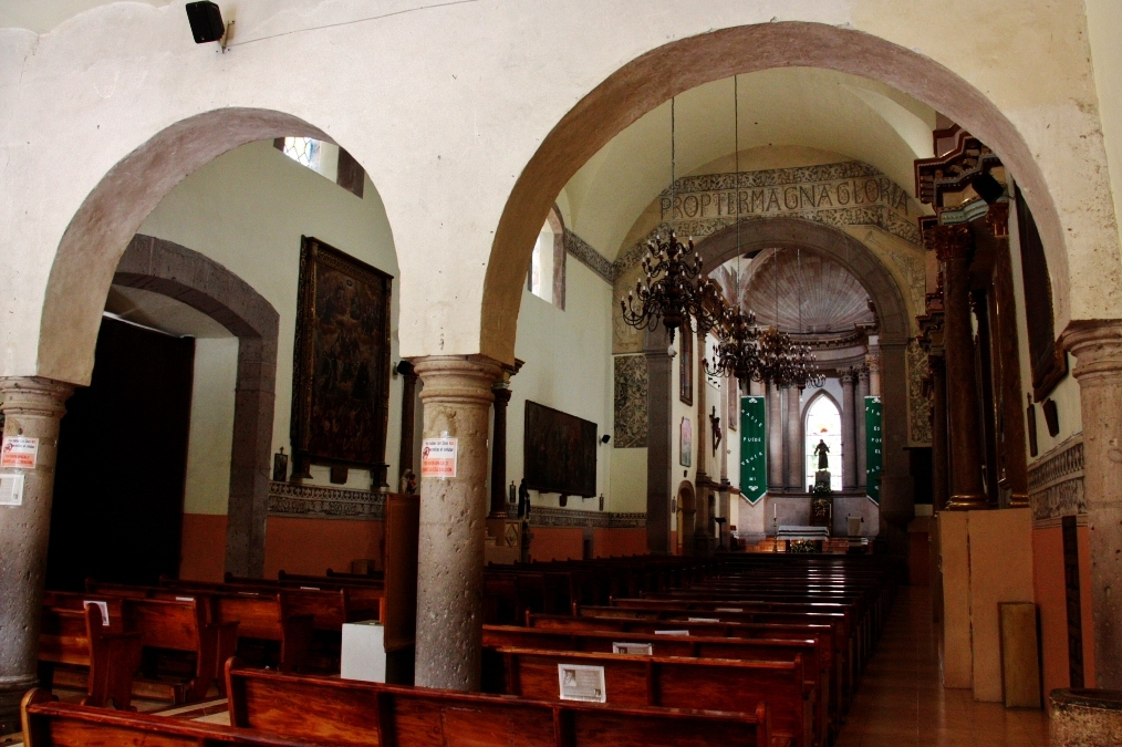 Igreja São Francisco de Assis, Tepeji del Rio, Estado de Hidalgo, México